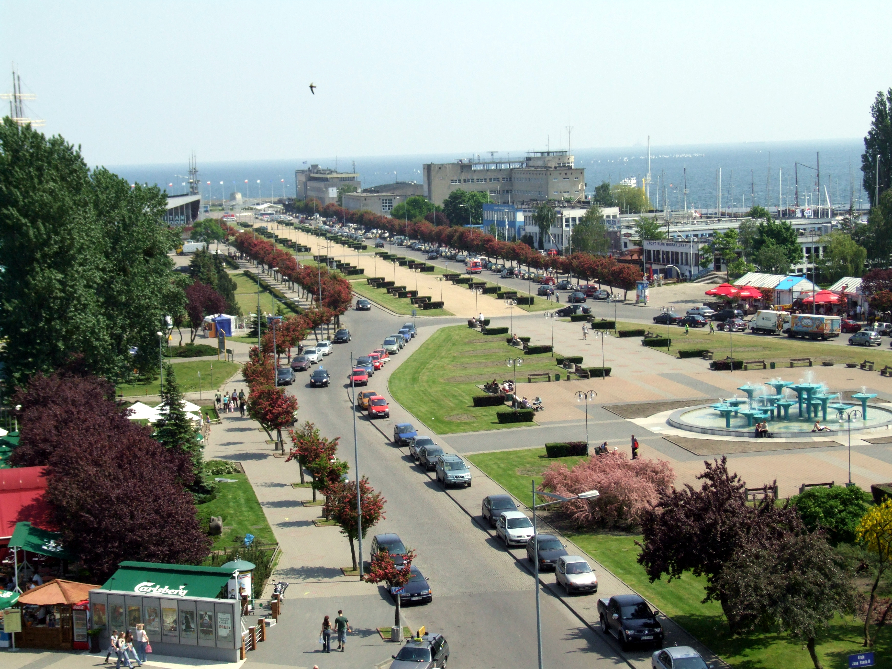 Gdynia, aleja Jana Pawła II (wcześniej Aleje Zjednoczenia)